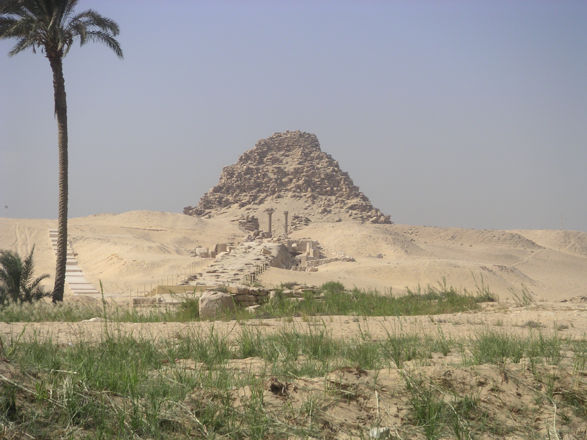 Vue de la pyramide de Sahourê à Abousir avec sa chaussée montante et son temple haut. Ve dynastie - Ancien Empire